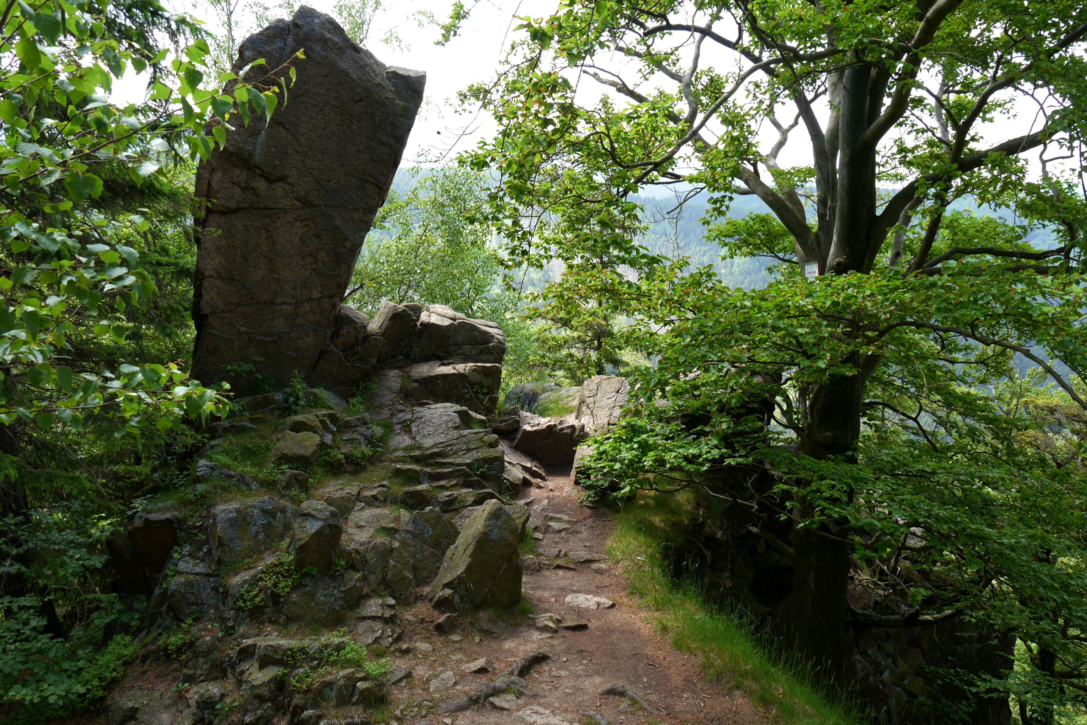 Paternosterklippe im Gebiet der Kleinstadt Ilsenburg (Harz): Hoch über dem Tal der Ilse im Harz ragt diese Klippe auf.